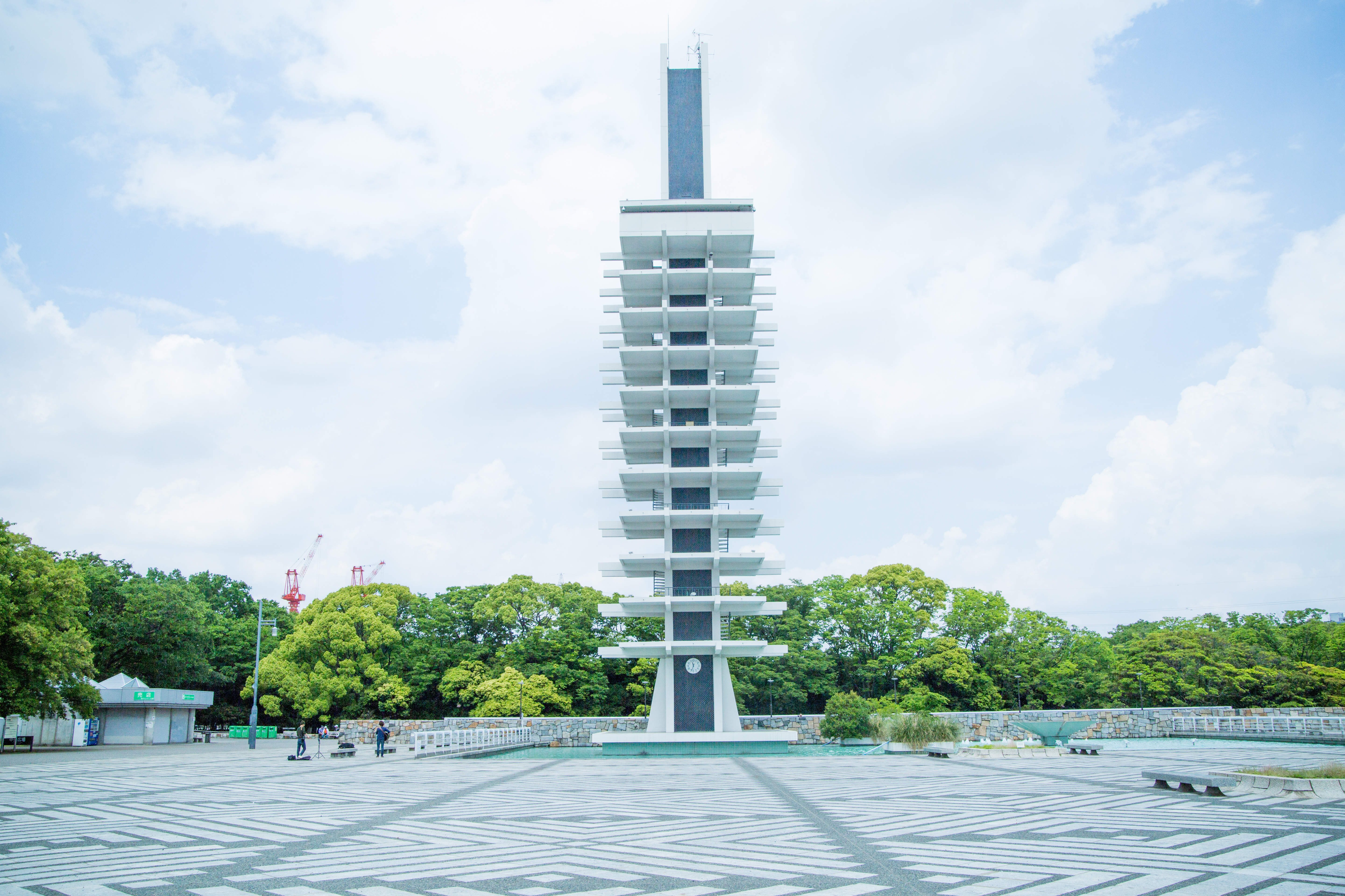 駒沢オリンピック公園